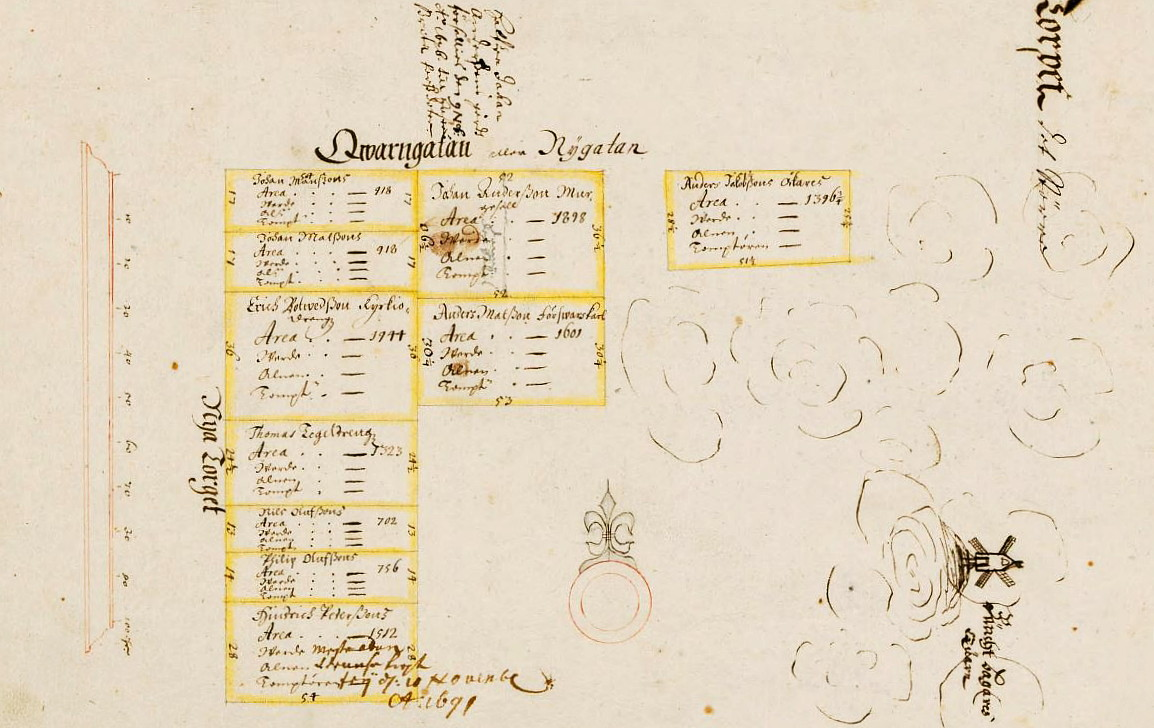 Kvarteret Bonde Torpet det större (nuvarande Bondesonen större)